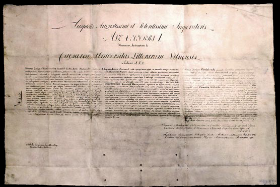 Адкрыты ліст на правядзенне палявых даследаванняў, выдадзены З. Даленгу-Хадакоўскаму